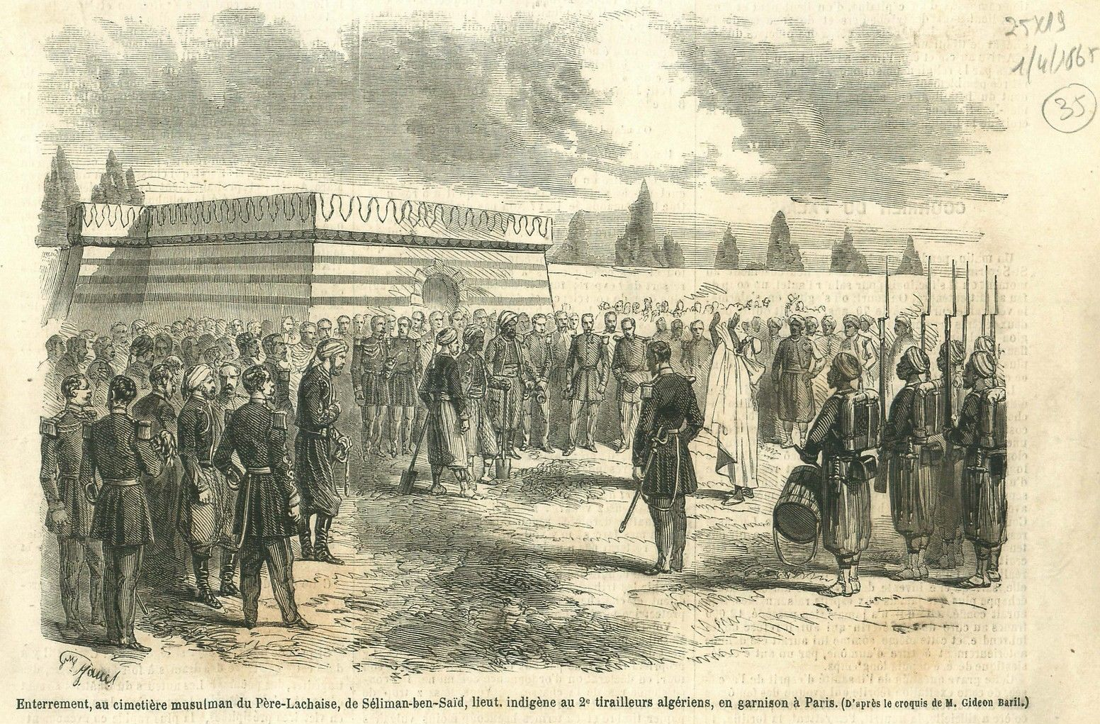 Enterrement dans l'enclos musulman (division 85) du cimetière du Père-Lachaise, de Séliman-ben-Saïd, lieutenant indigène au 2e régiment de tirailleurs algériens en garnison à Paris. D'après le croquis de Gideon Baril.